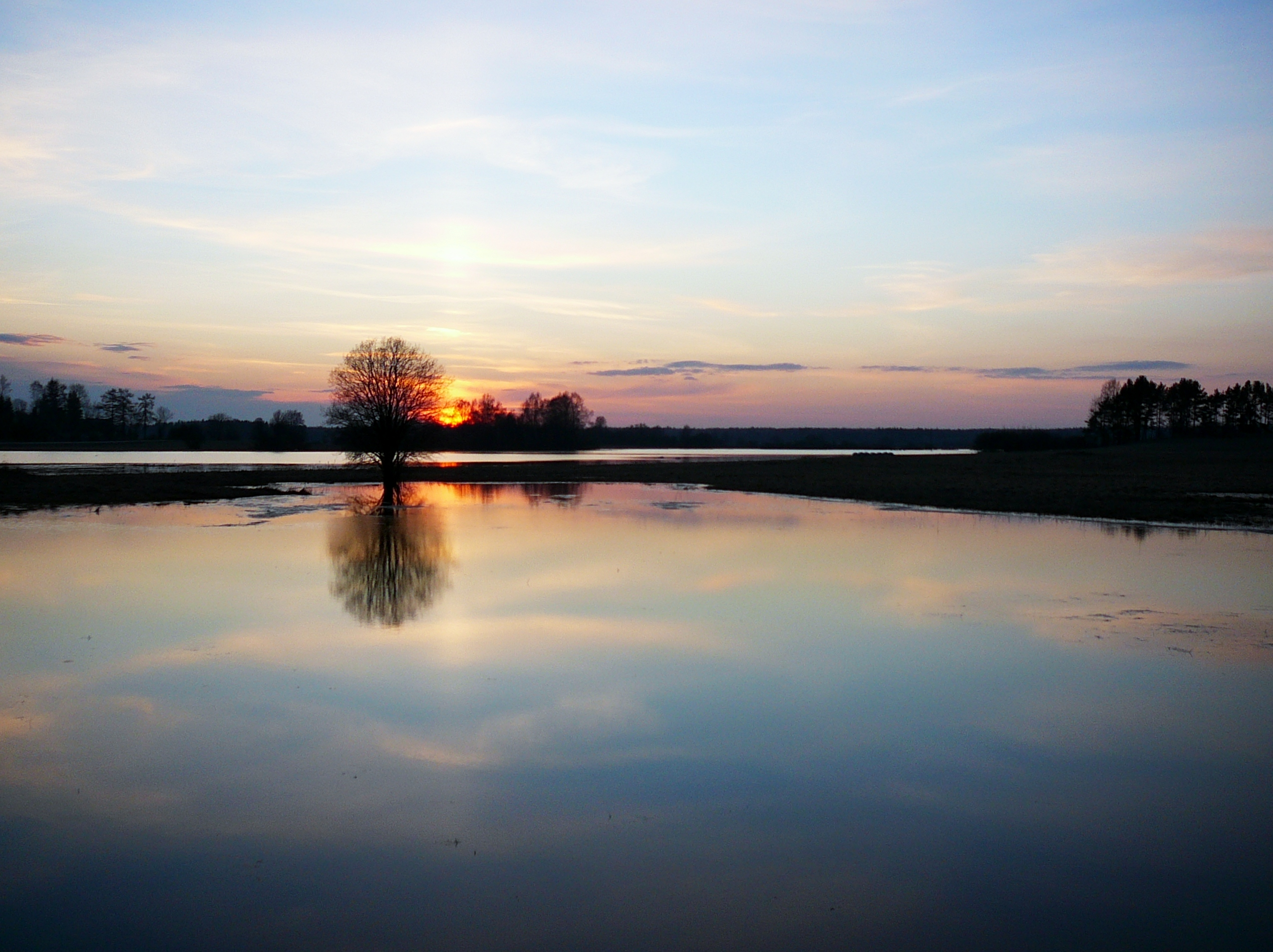 Pandivere veekaitseala. Porkuni maastikukaitseala piiril asuval Assamalla luhal on keskkonnaamet teinud ettepaneku viia väetiste ja taimekaitsevahendite kasutamise piir veekogudest senise 25 meetri asemel 50 meetri kaugusele.